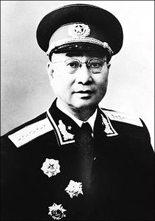 陈赓